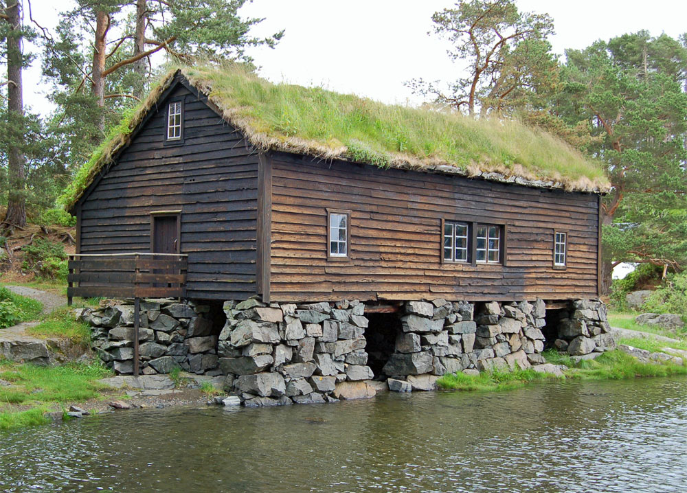 Rorbu im Sunnmøremuseum in Ålesund